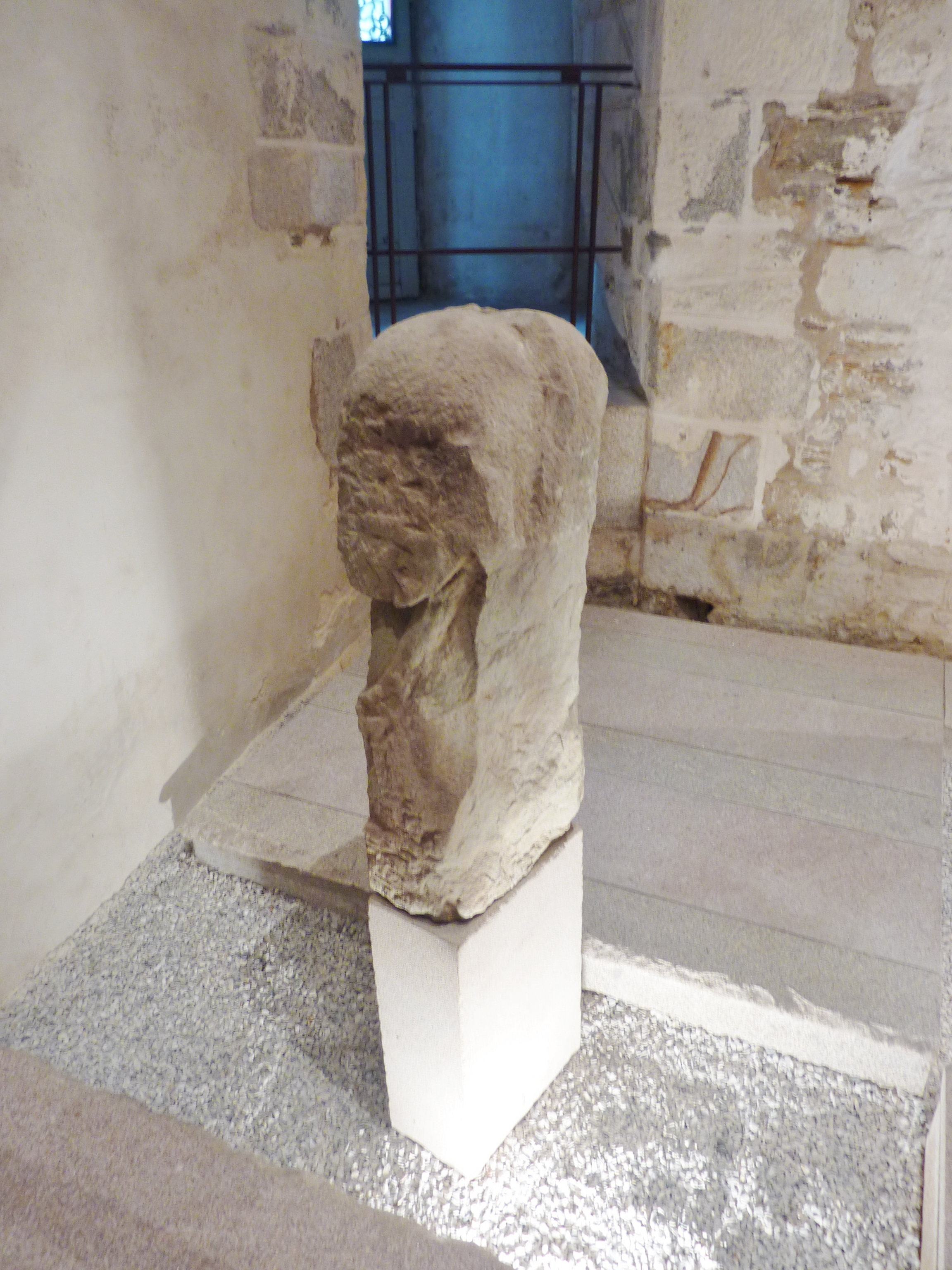 Lennon : stèle gauloise à deux têtes adossées (Musée départemental breton de Quimper) en grès, provenant de Kergonniou en Lennon et datée de l'âge du fer. Représentation d'une divinité au caractère double, peut-être la vie et la mort